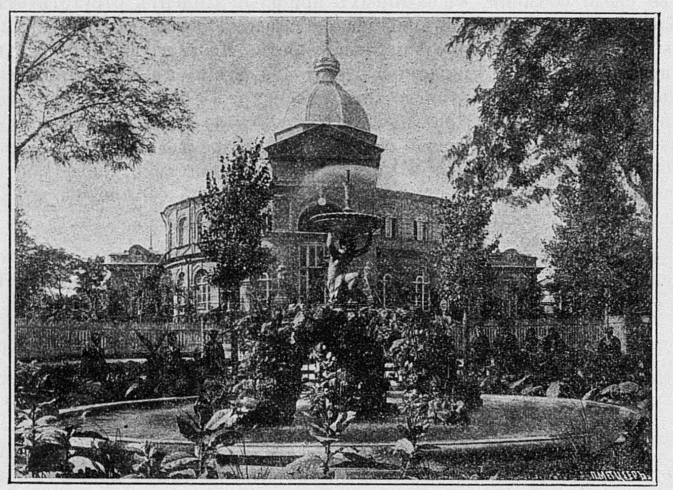 Ротонда и главный фонтан городского сада Ростова-на-Дону